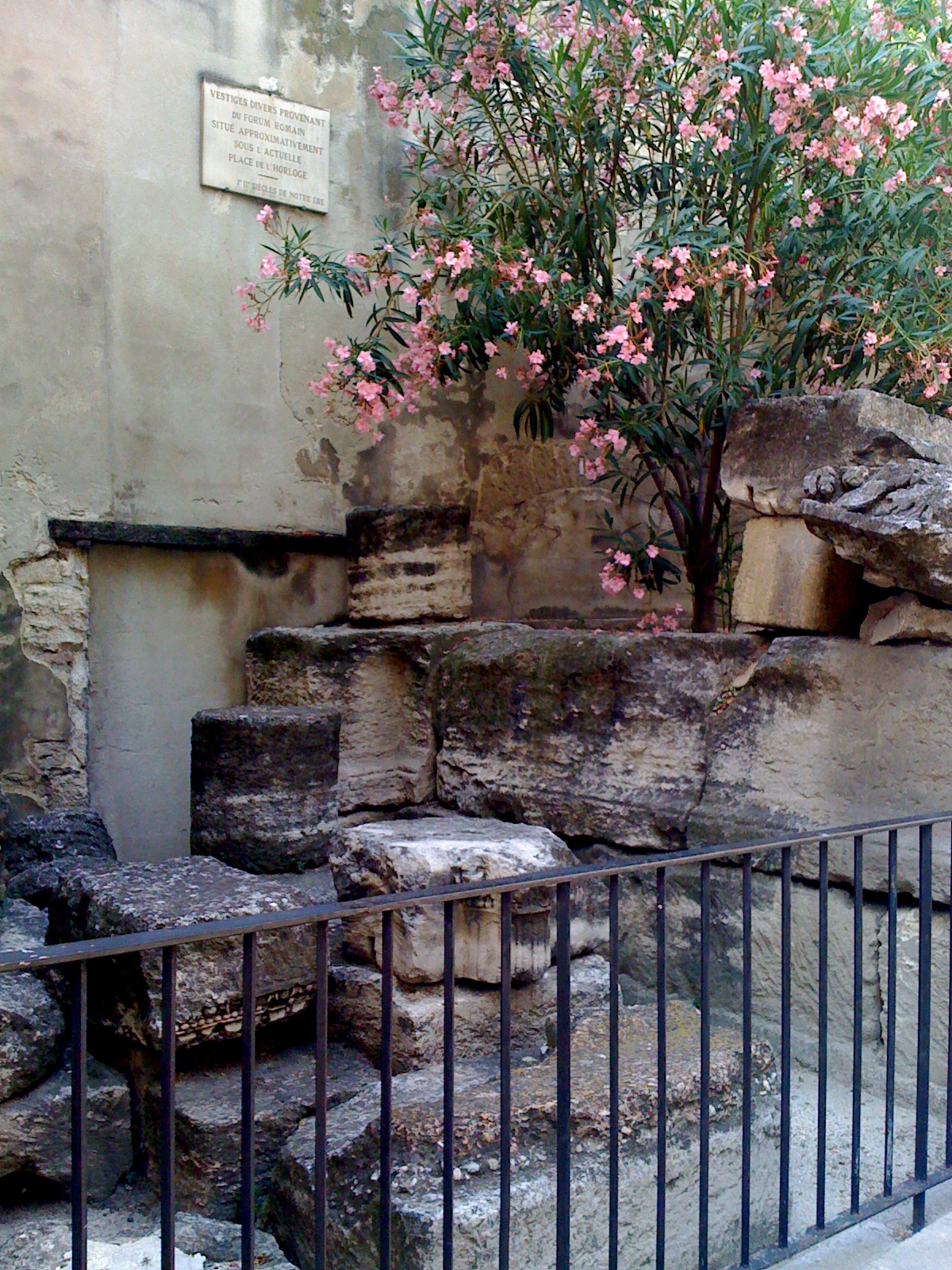 Vestiges romains provenant de la place de l'Horloge à Avignon